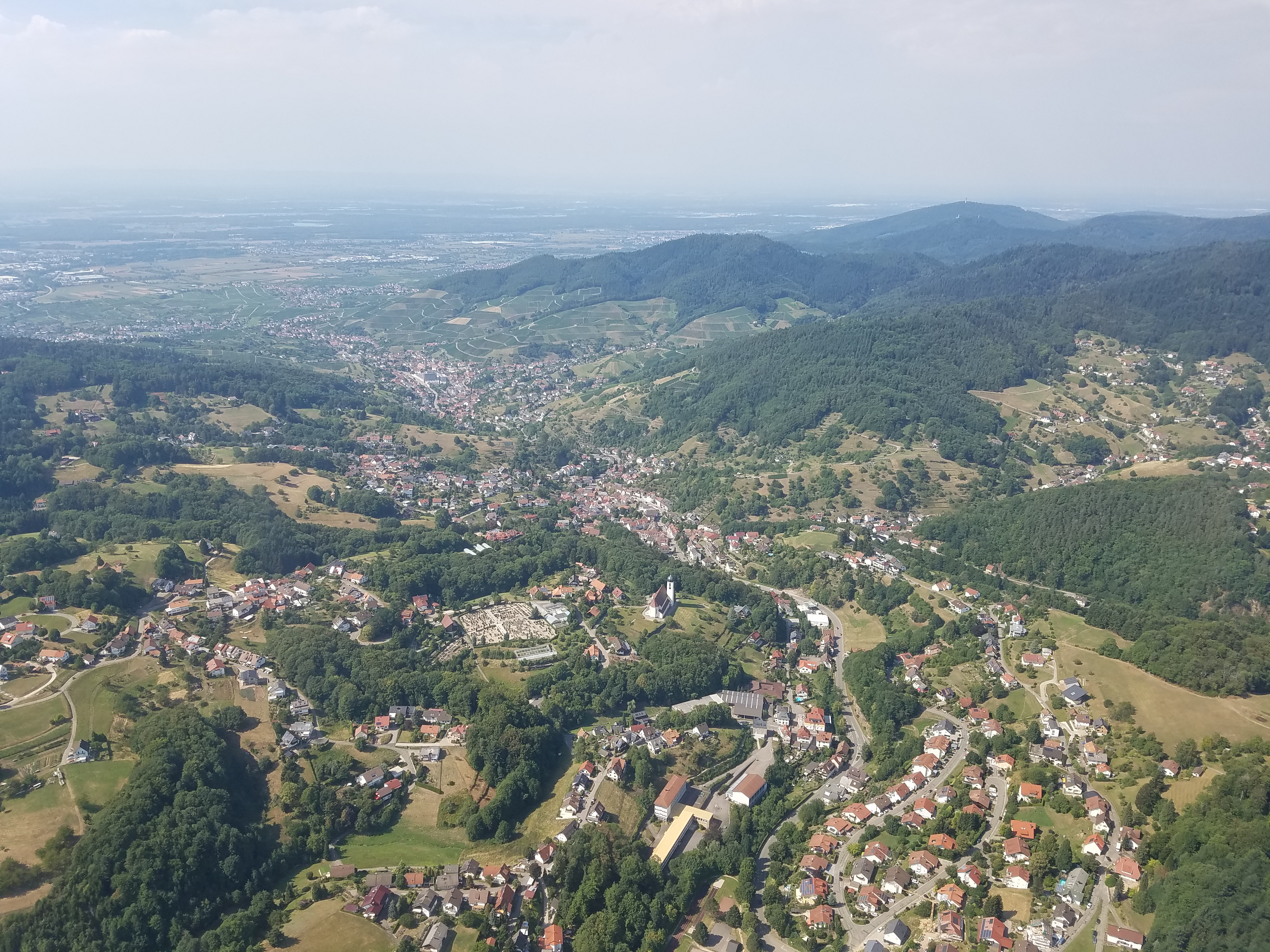 Luftaufnahme von Bühlertal von Südosten aus